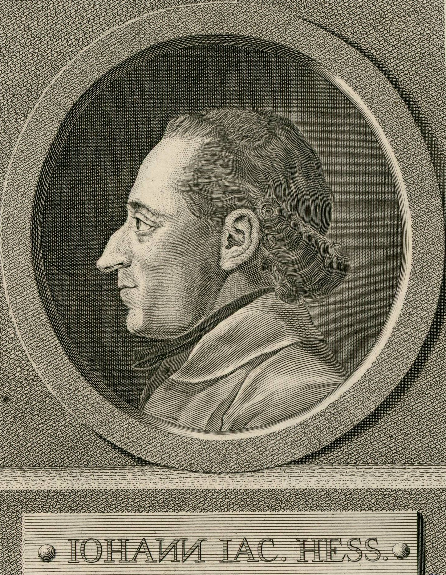 Portrait von Johann Jakob Hess; Stich aus Lavaters Physiognomischen Fragmenten.